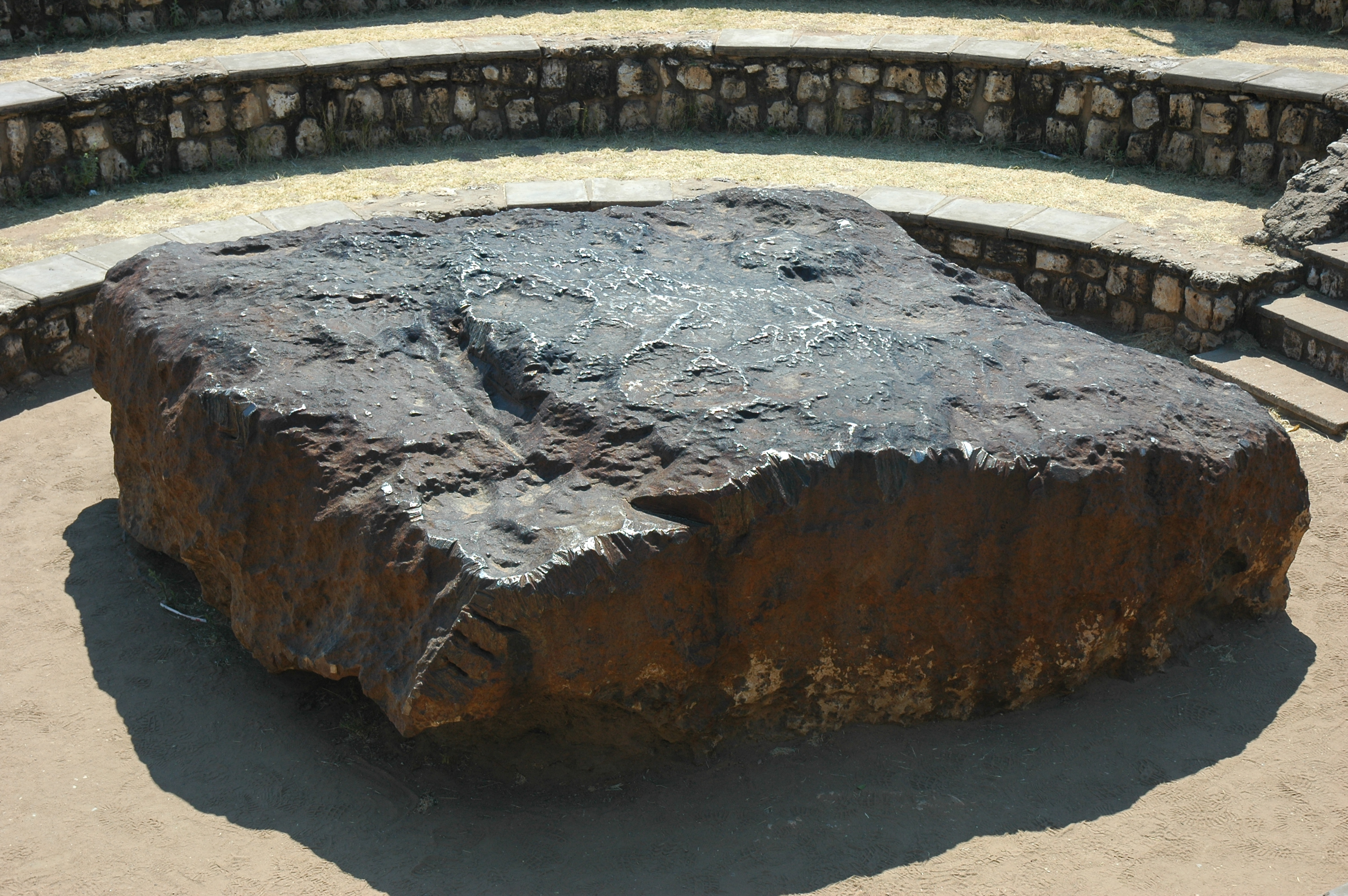 Namibie Météorite Hoba Photographie prise par GIRAUD Patrick